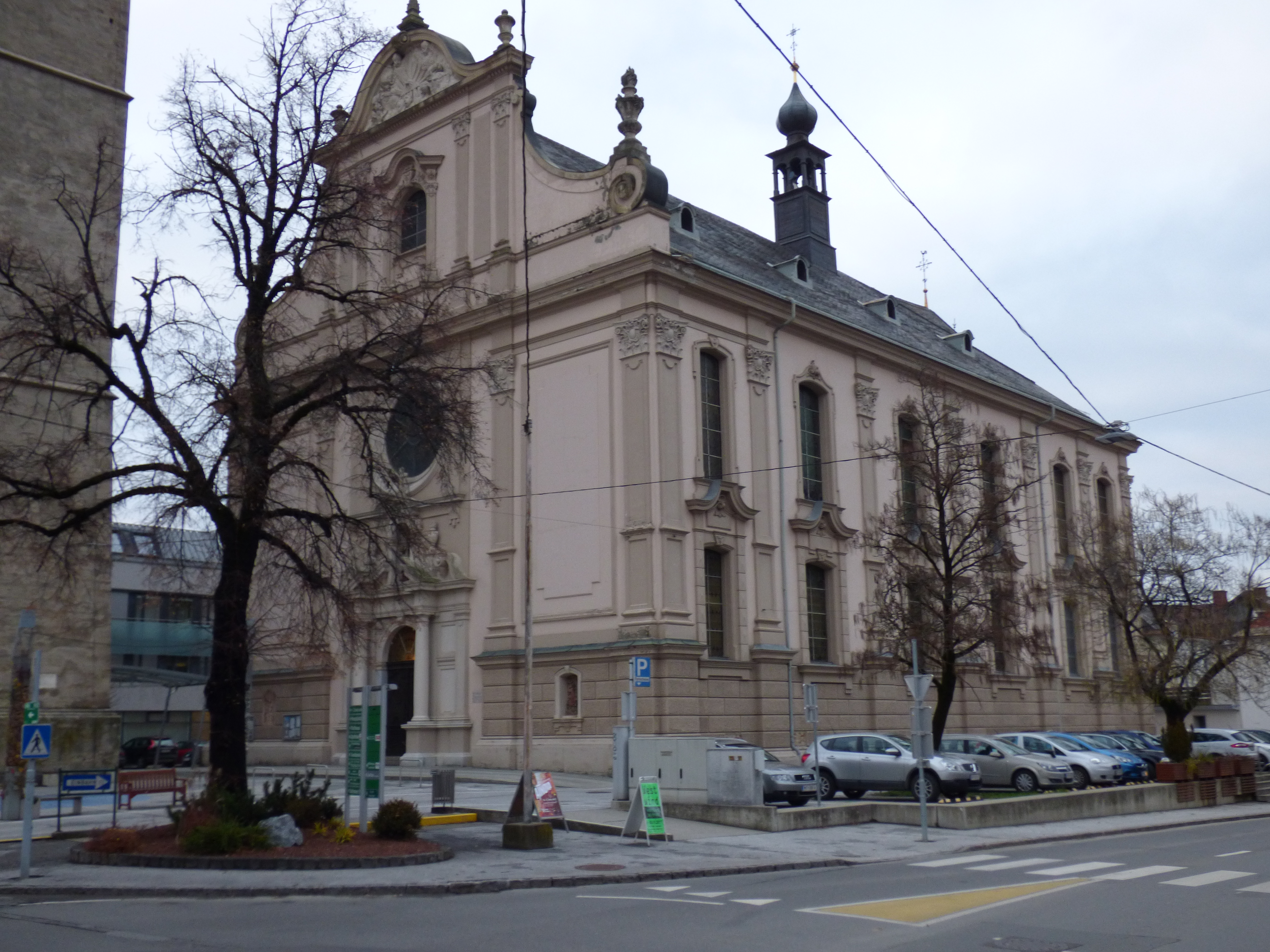 Kath. Pfarrkirche hl. Nikolaus, Judenburg